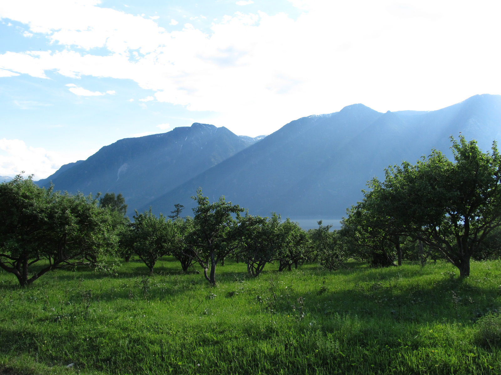 Алтын-ту